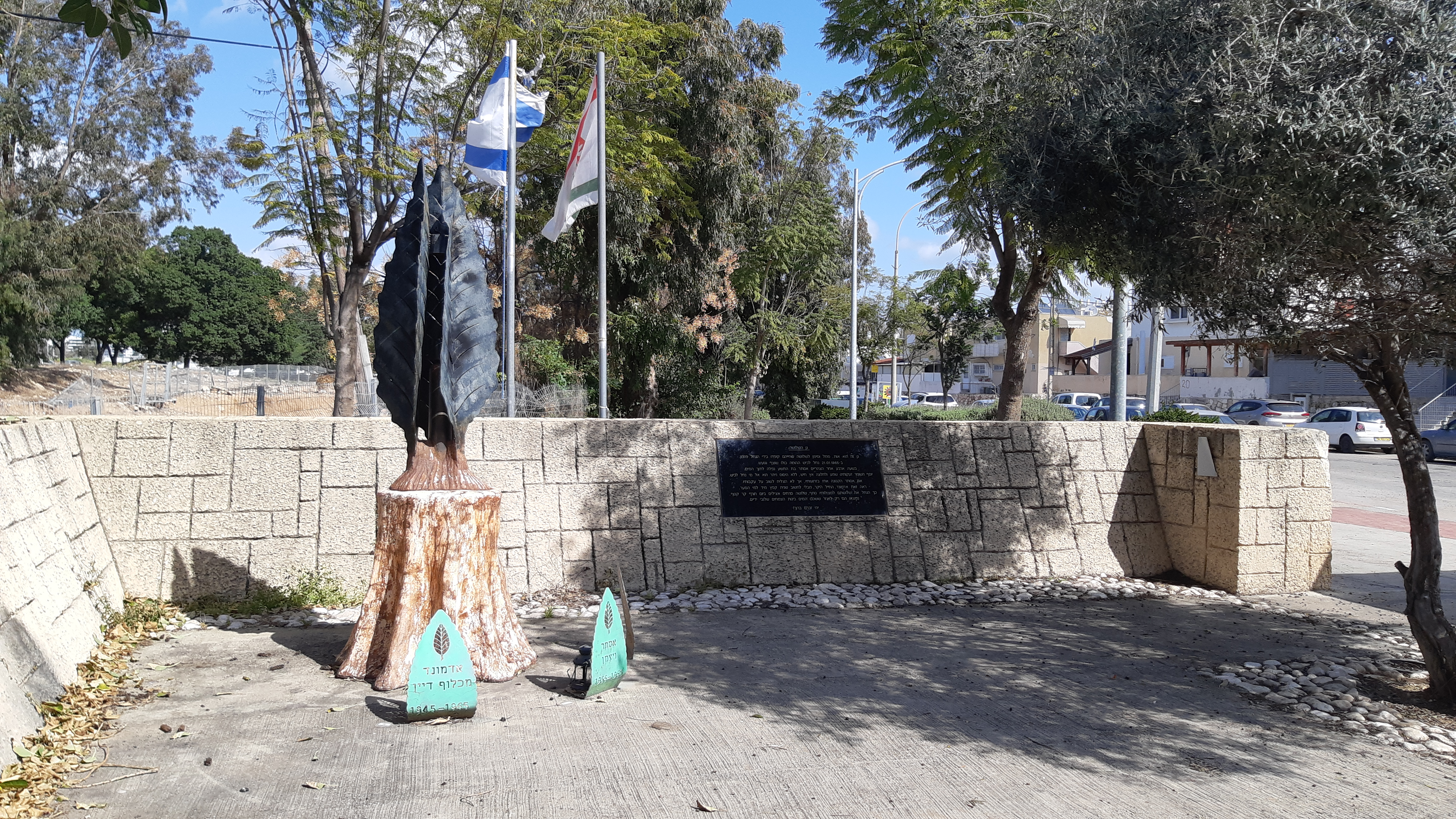 פינת הזכרון לייד גשר השלושה - קרית גת